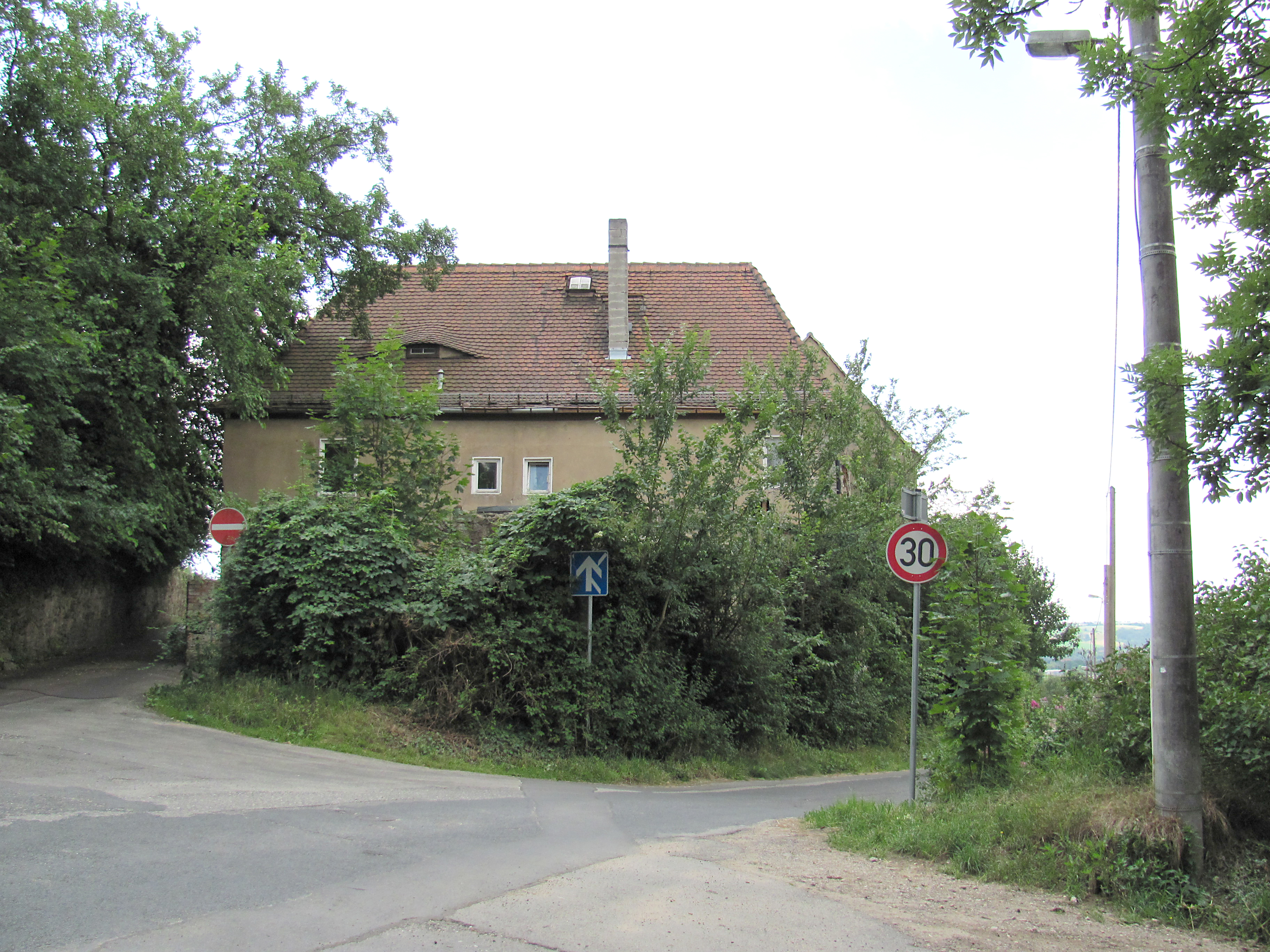 Radebeul, Haus Baurick Nordflügel